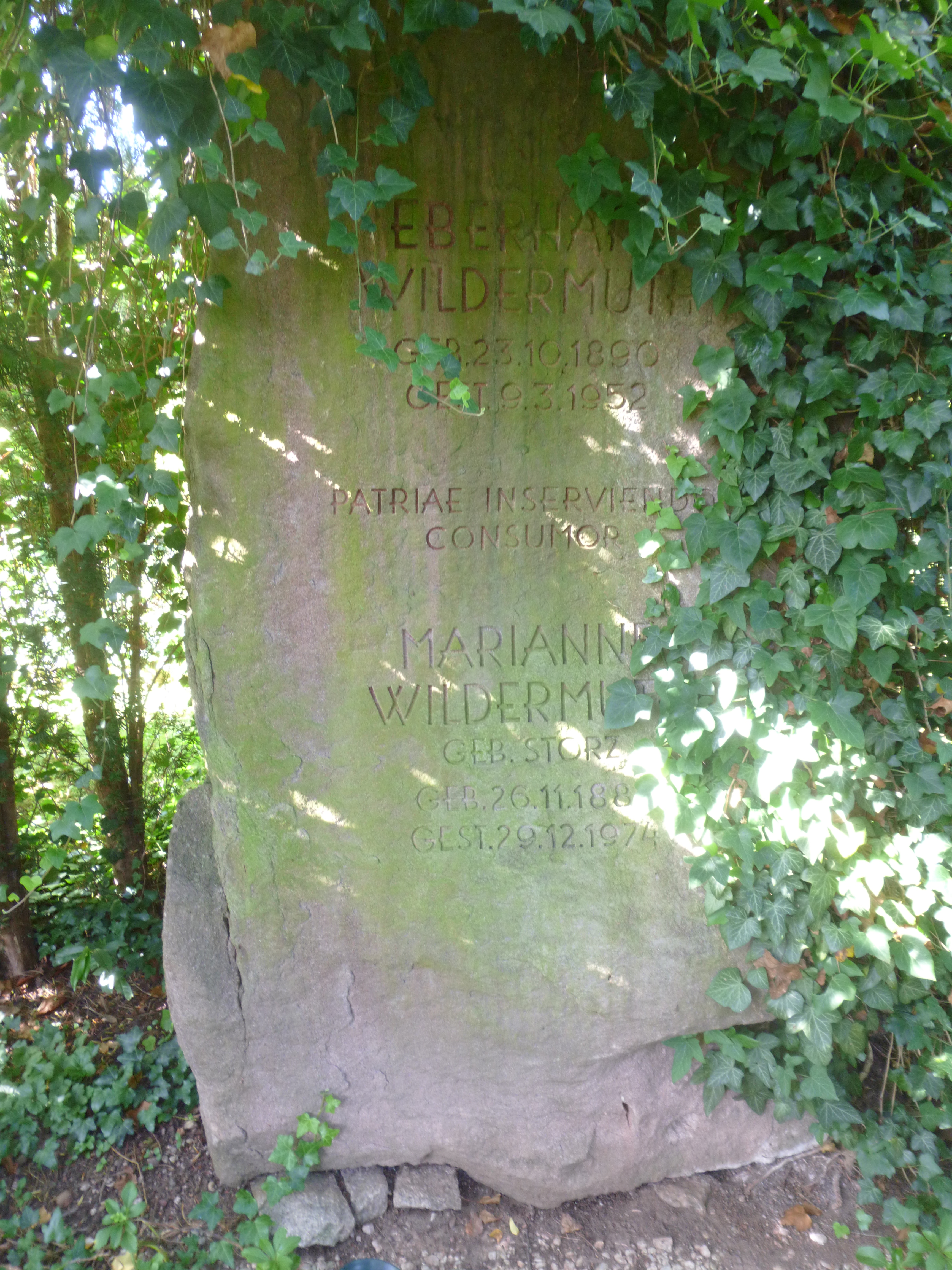 Eberhard Wildermuth Stadtfriedhof Tübingen